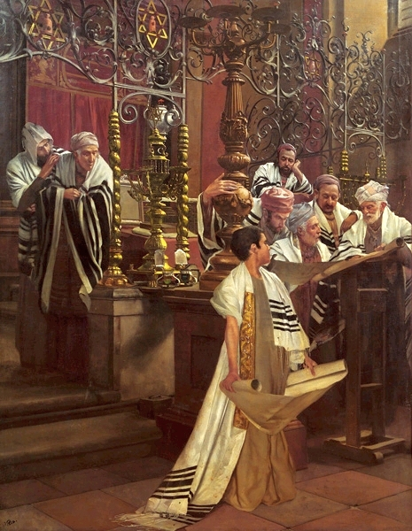 Darstellung einer Bar Mitzwa in einer Synagoge.